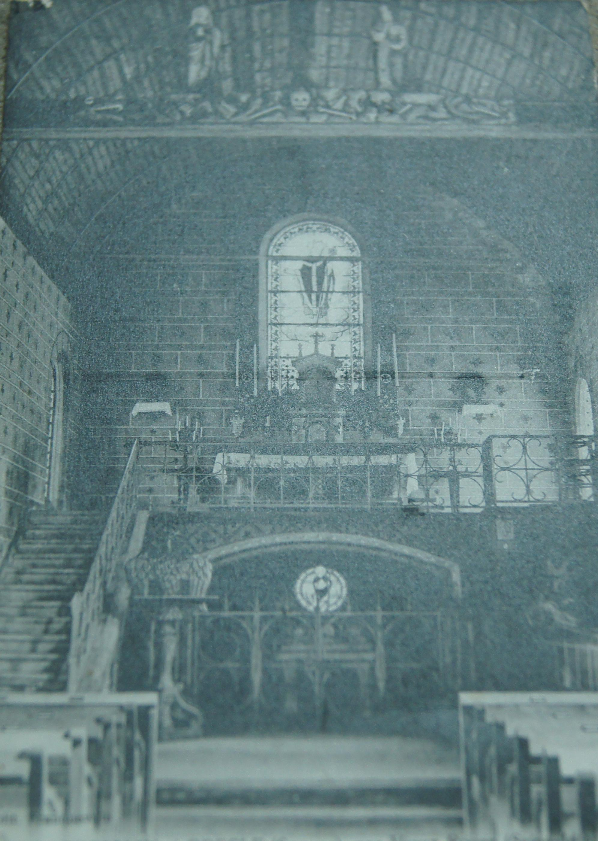 Crypte Saint-Germain-l'Ecossais durant l'entre deux guerres